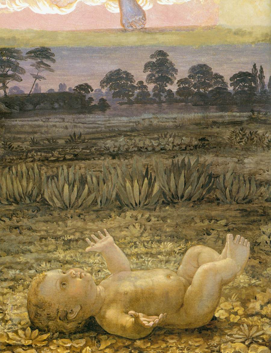 detail